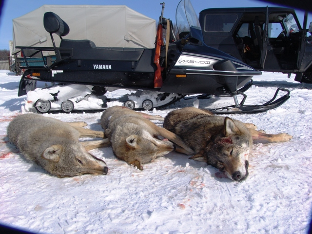 Регулирование численности волков в охотничьем хозяйстве Алексеевского района Волгоградской области